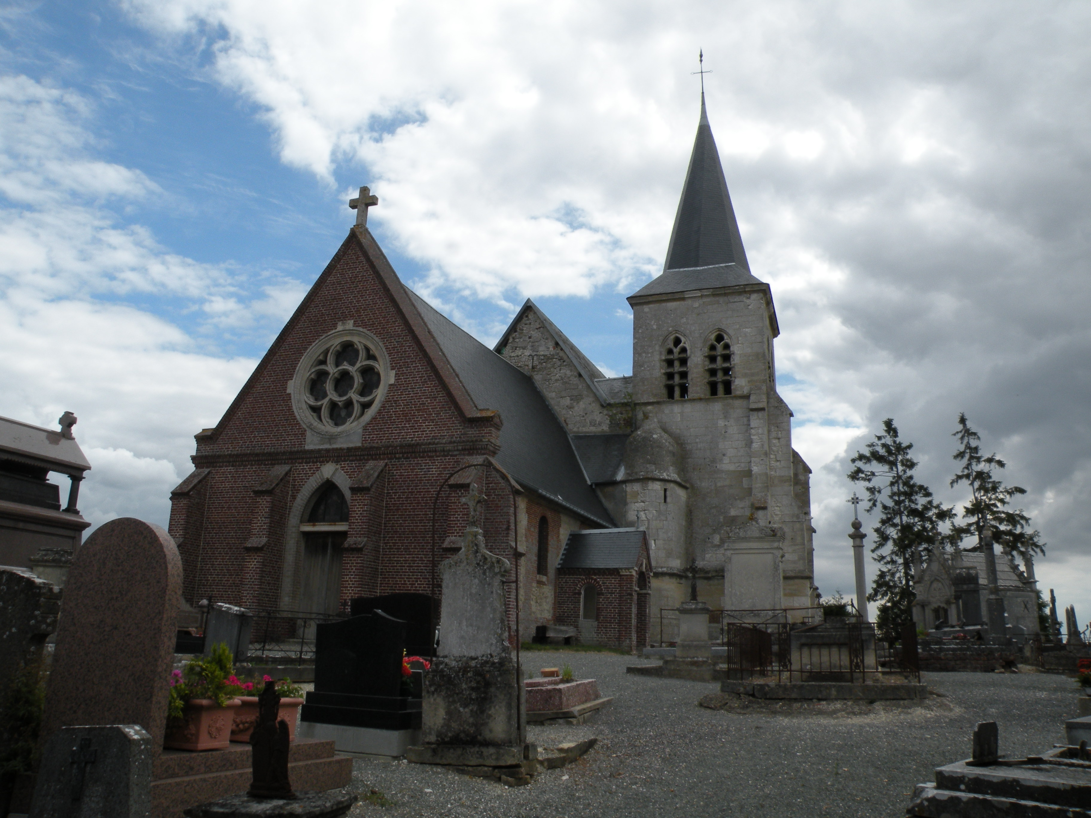 eglise de Saint-Sulpice (Oise)